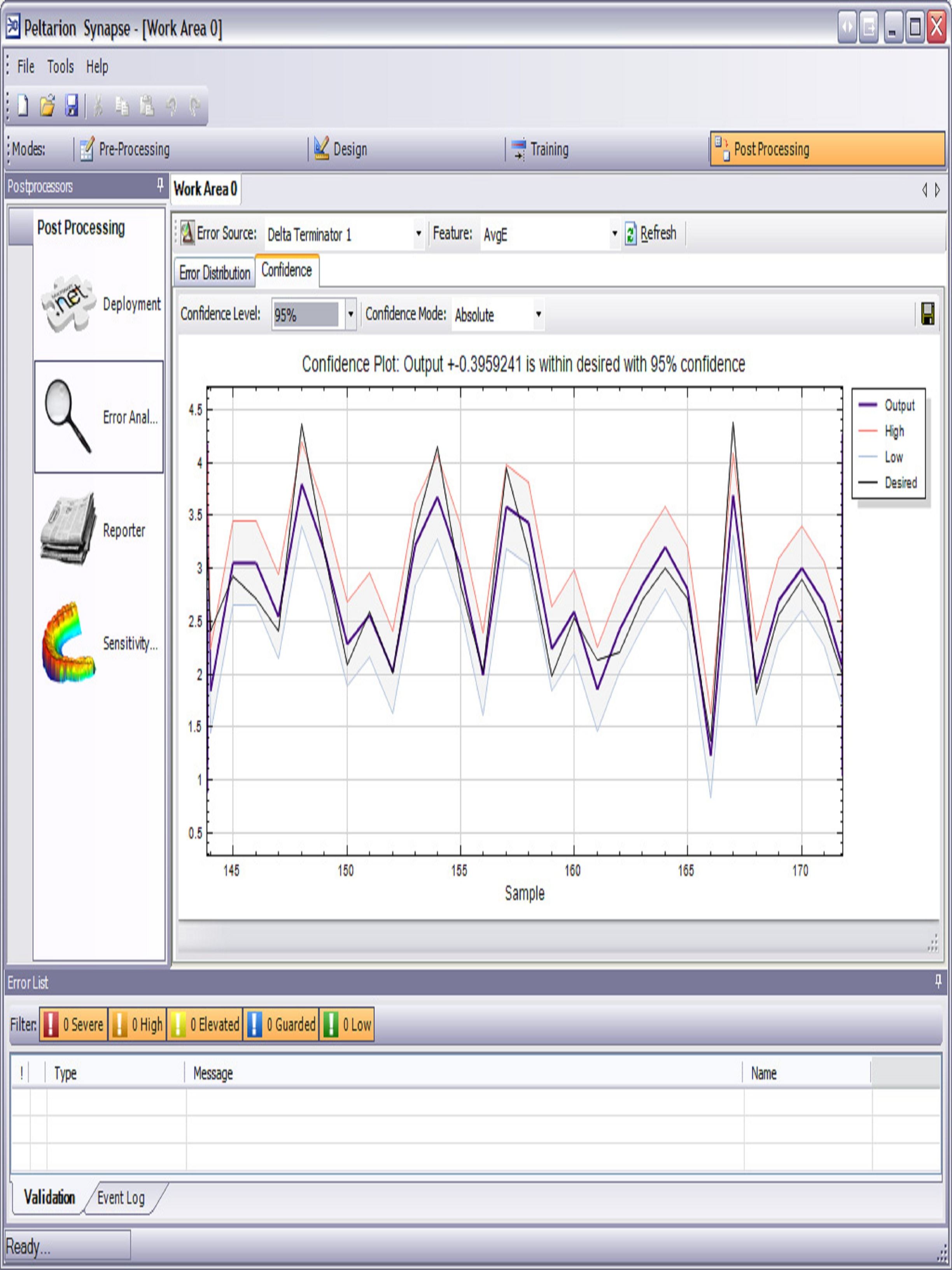 Despliegue de Red Sinapse_edit2017.jpg